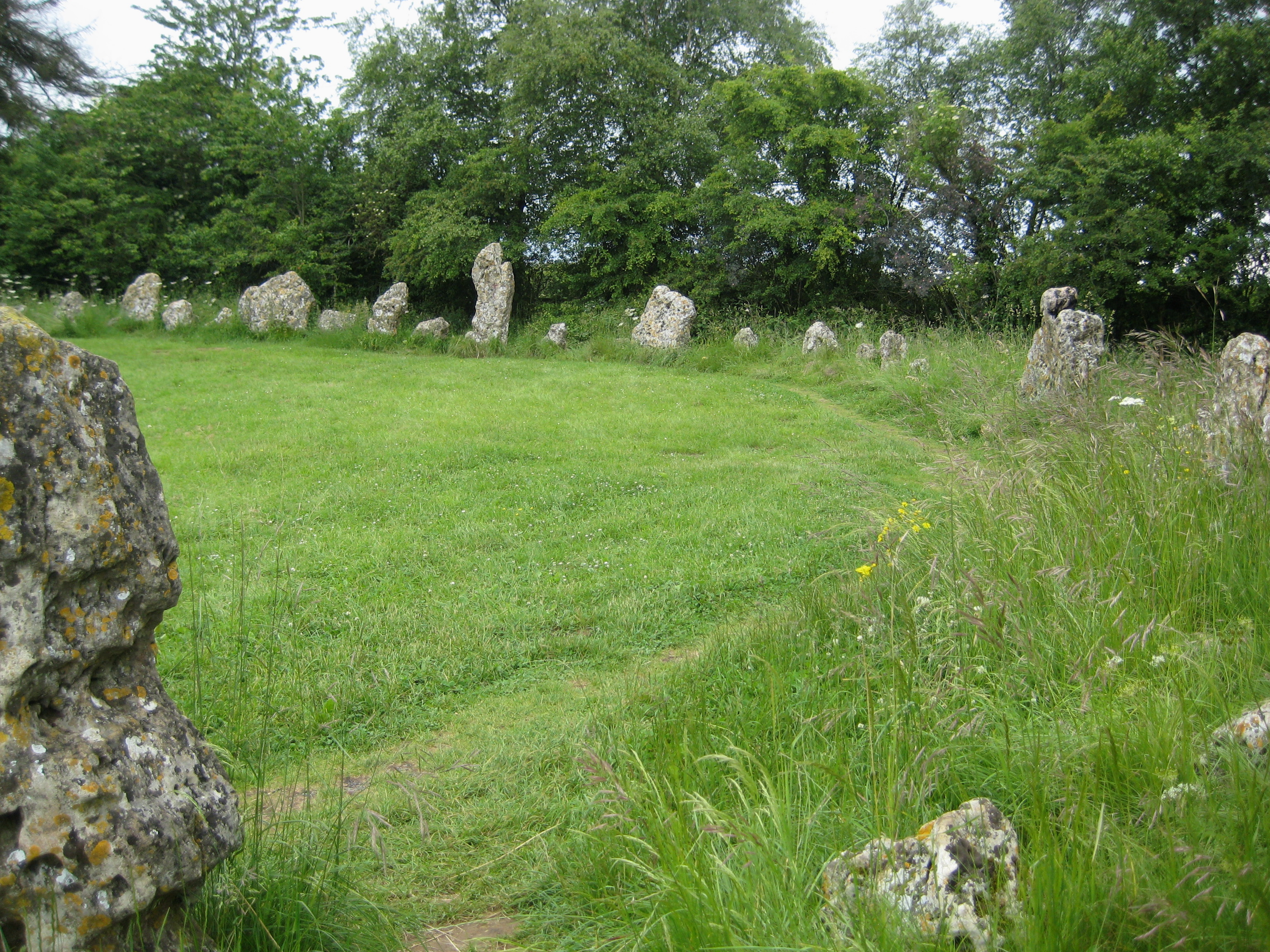 Kings Men Rollright Stones